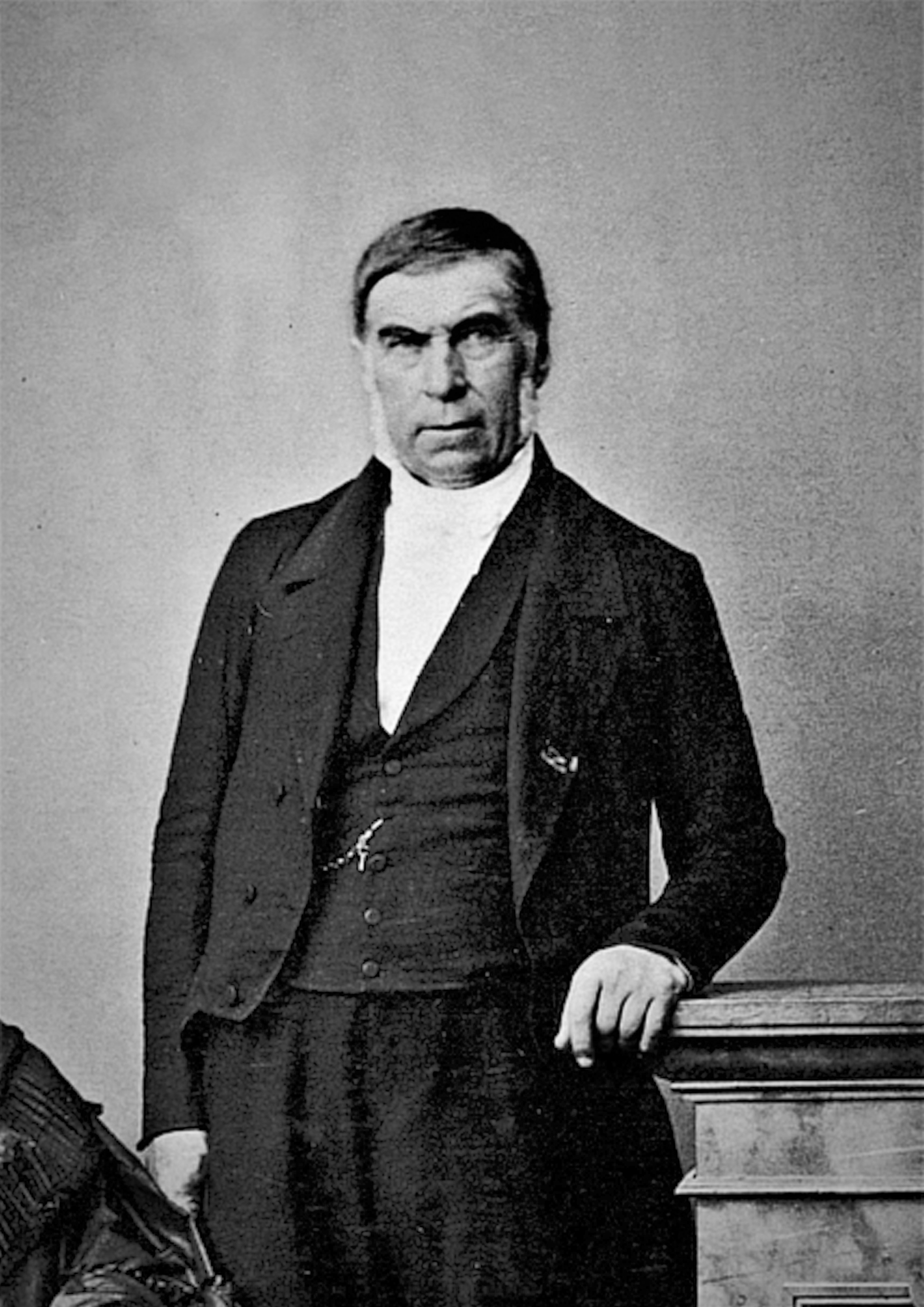 Le doyen Jean Pierre Thomas de Boisgiraud, photographié par Amédée Denisse dans les années 1860, portrait affiché dans la salle du conseil de la FSI (Collection Doyen Jean Claude Delaunay, BNF, bibliothèque de l'Arsenal, avec permission)